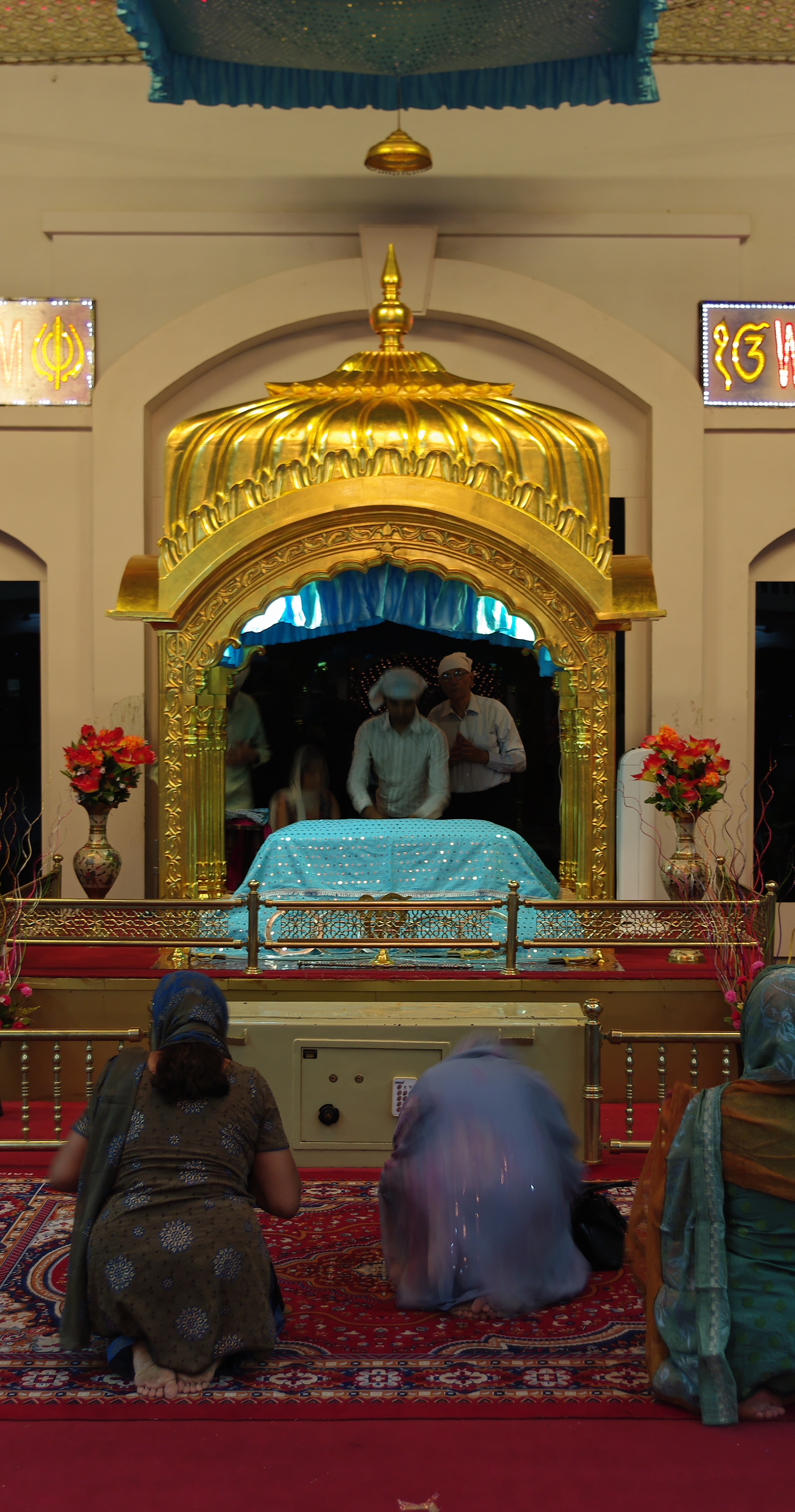 Diwali in Ahmedabad, India